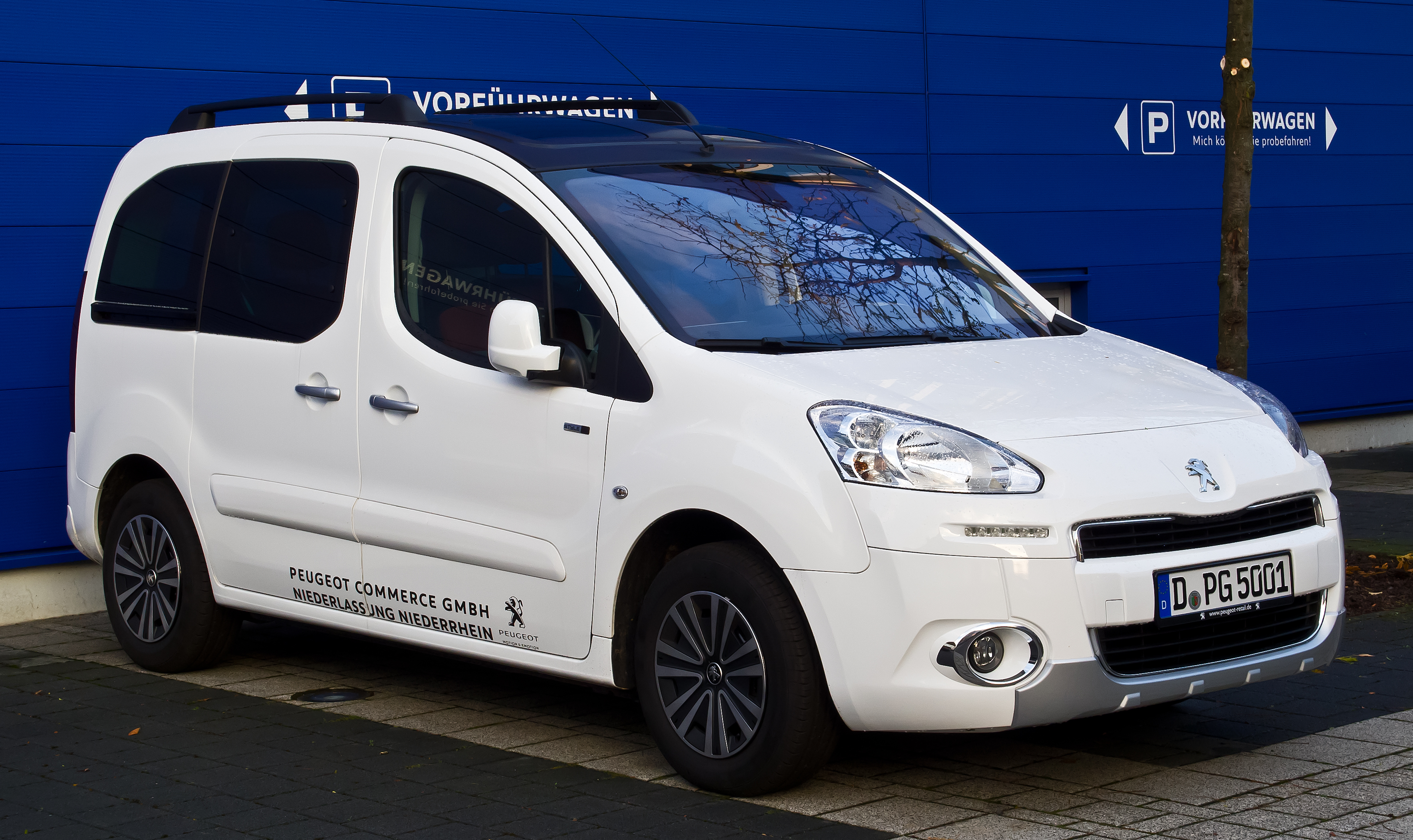 Peugeot Partner Tepee 120 VTi Style (II, Facelift)